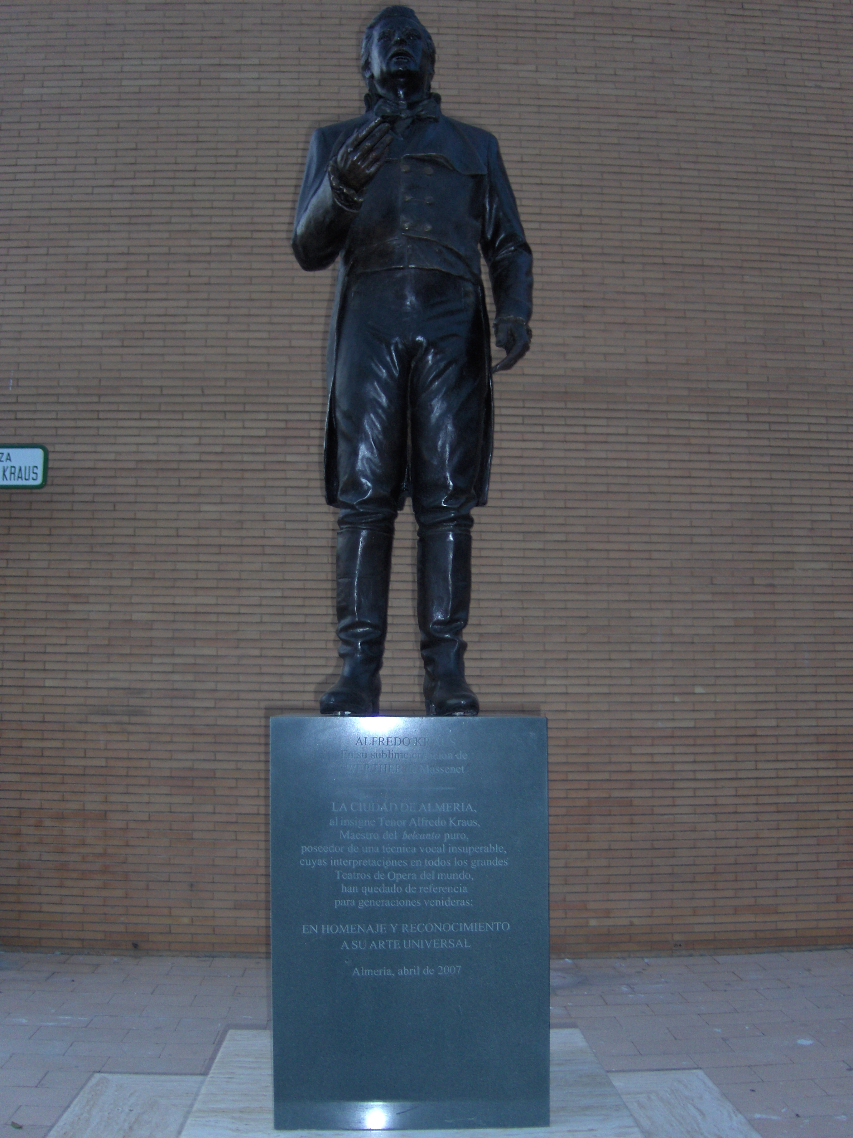 Estatua a Alfredo Kraus en Almería, de 2006